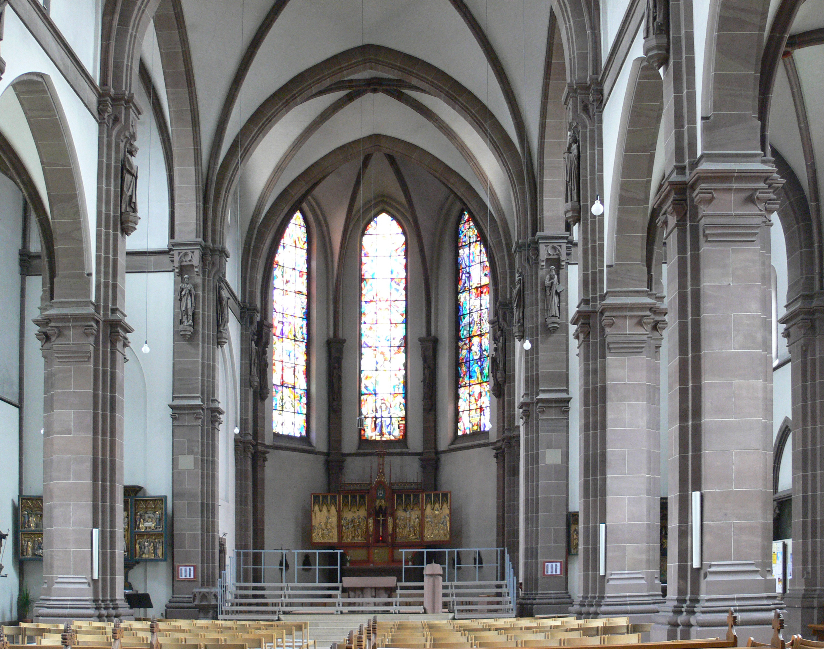 Heilig-Geist-Kirche (Kath. Pfarrkirche Hl. Geist), Schwetzingerstadt, Mannheim Innenansicht, Blick zum Chor mit Hochaltar